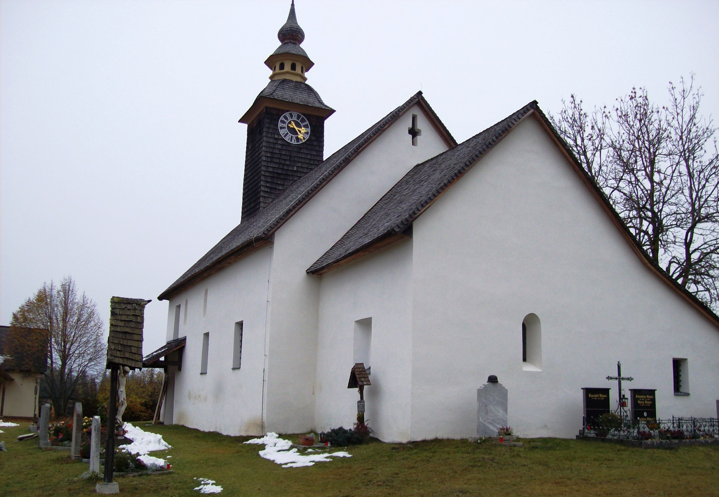 Kath. Filialkirche hl. Martin mit ummauertem Friedhof